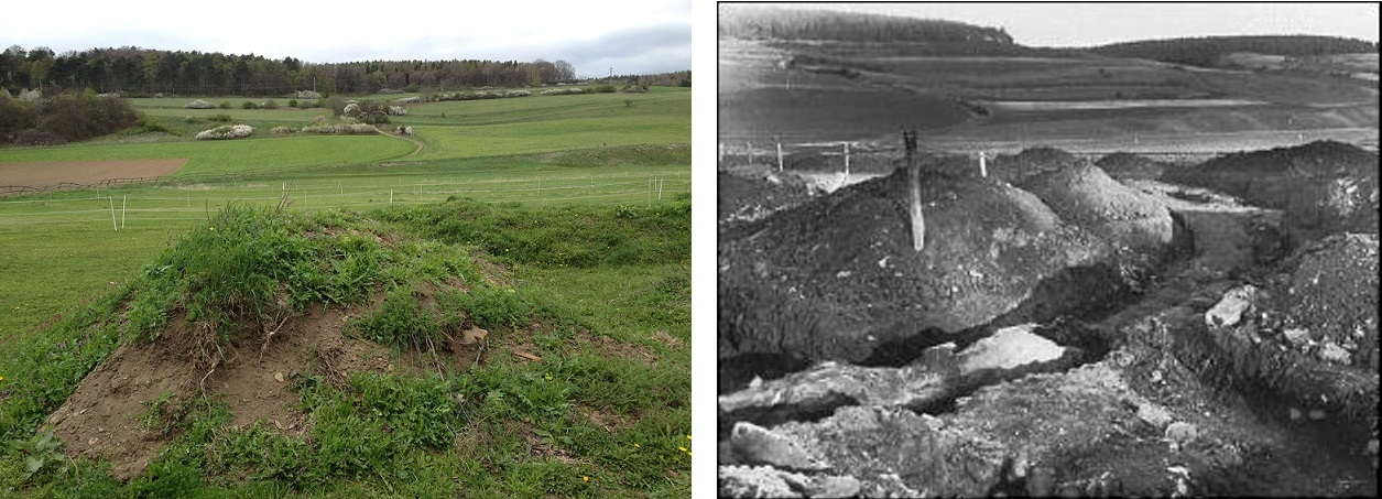 Goslar-Oker, Grabungsfeld Sudburg von Süden, 2017 und 1933